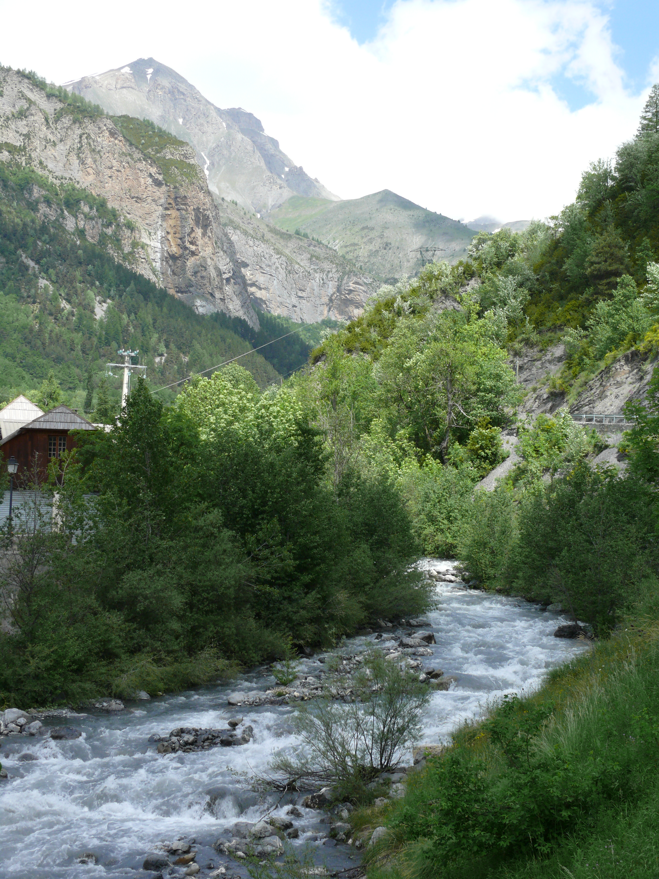 La vallée du Var à Entraunes